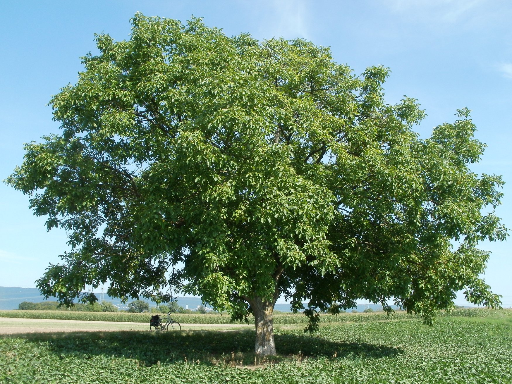 Walnussbaum bei Plankstadt